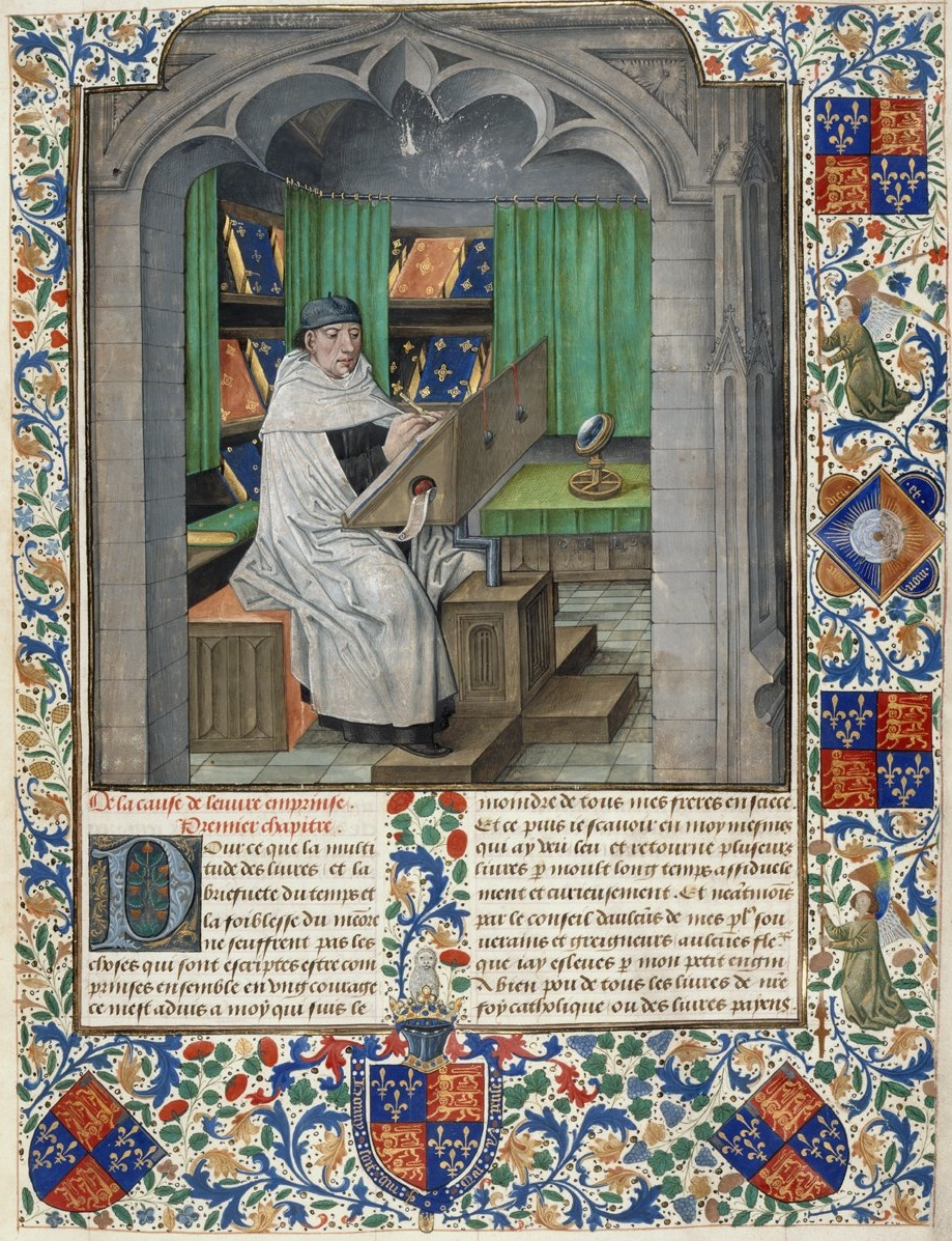 Miniature de Vincent de Beauvais comme moine dominicain, assis à son pupitre et écrivant le livre.